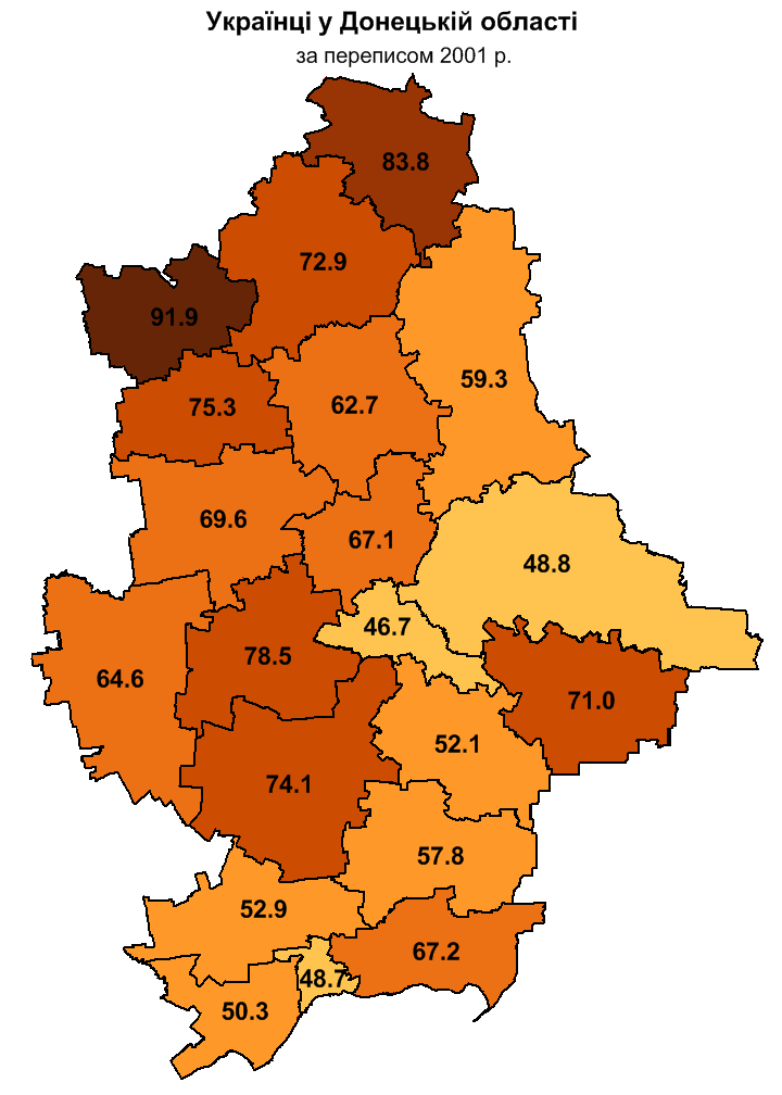 Розселення українців у районах (разом з містами) Донецької області за переписом 2001 р. / Ukrainians in Donetsk oblast, 2001 census